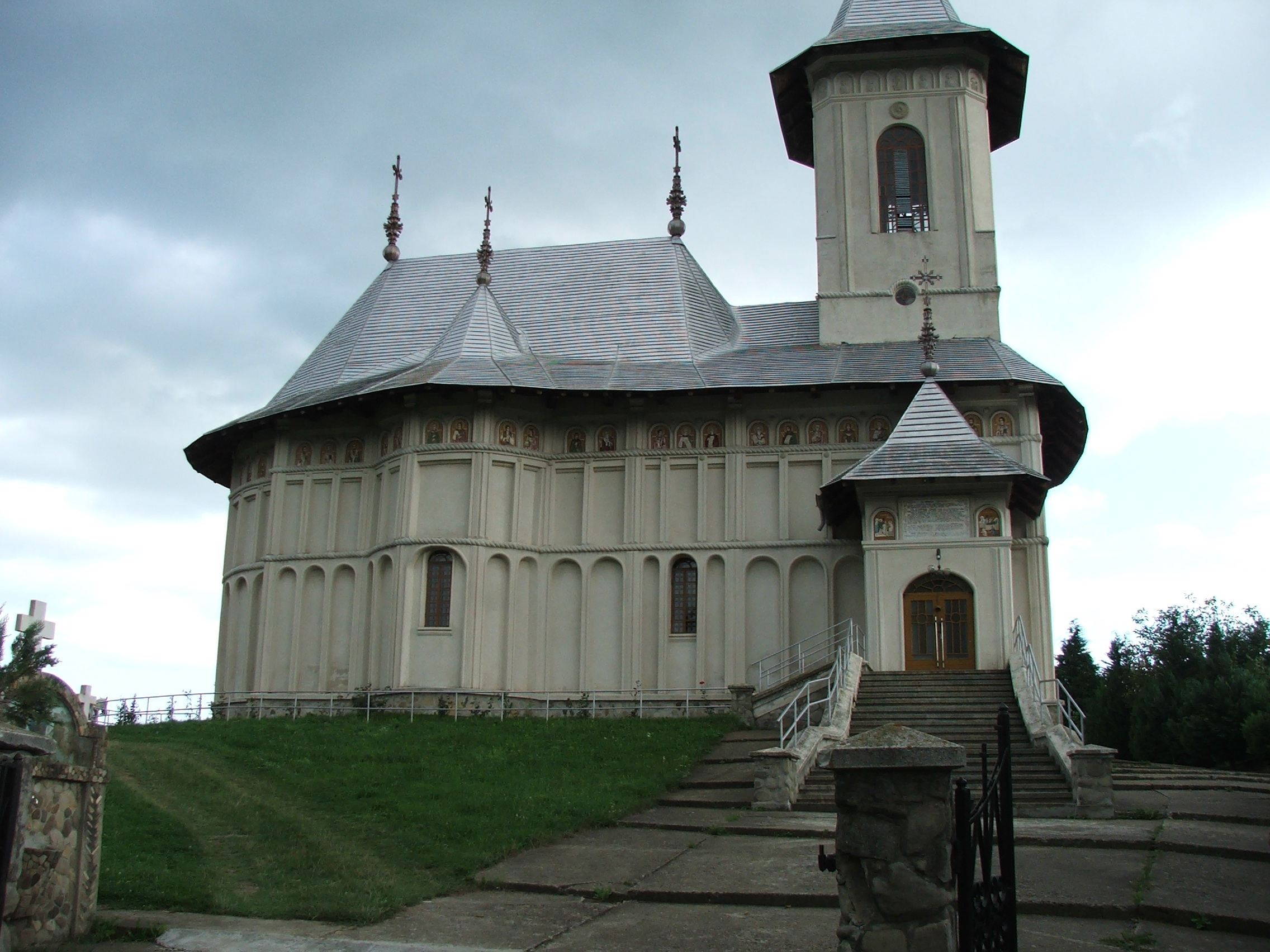 Chiesa della Nascita di Maria - Măgireşti (Romania)